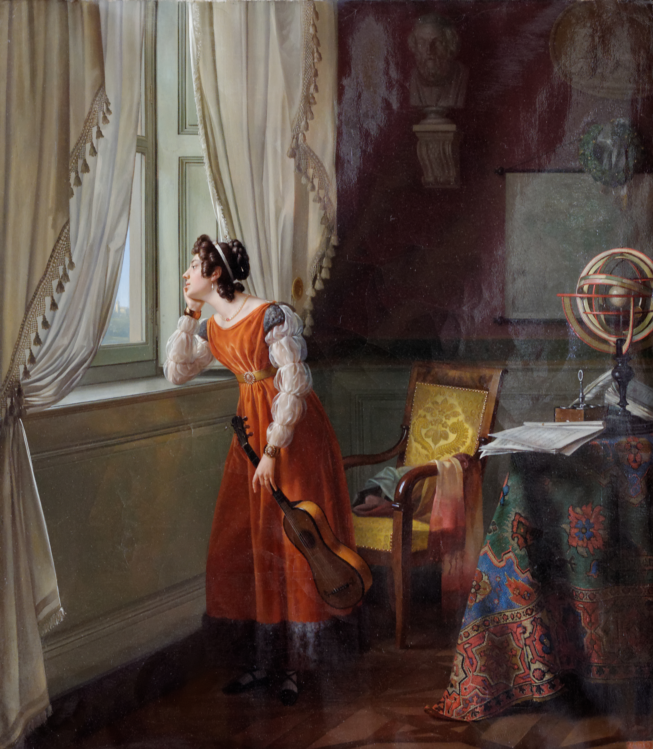 La Rêverie